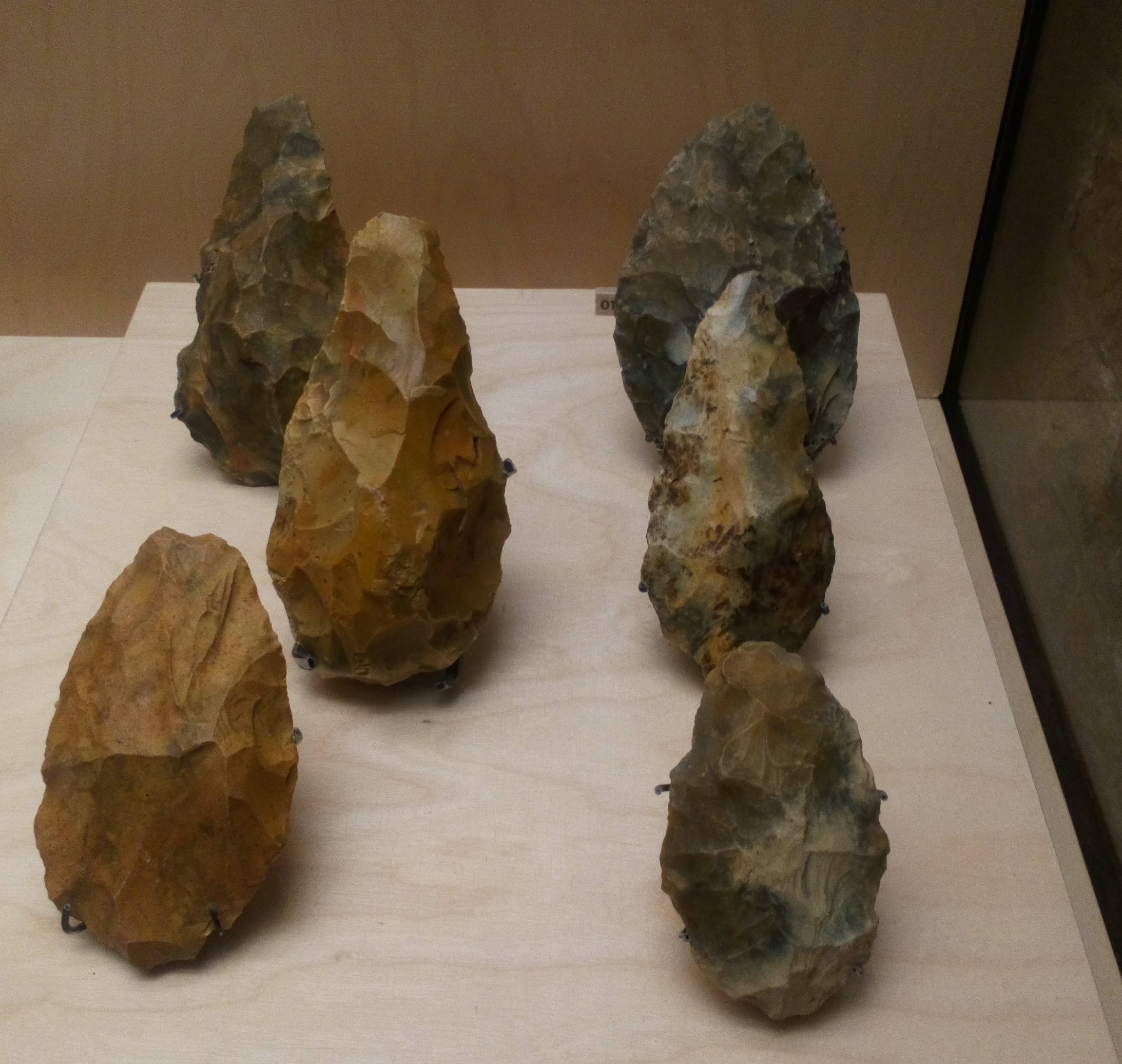 Musée de Picardie, bifaces provenant du moulin Quignon (Abbeville)